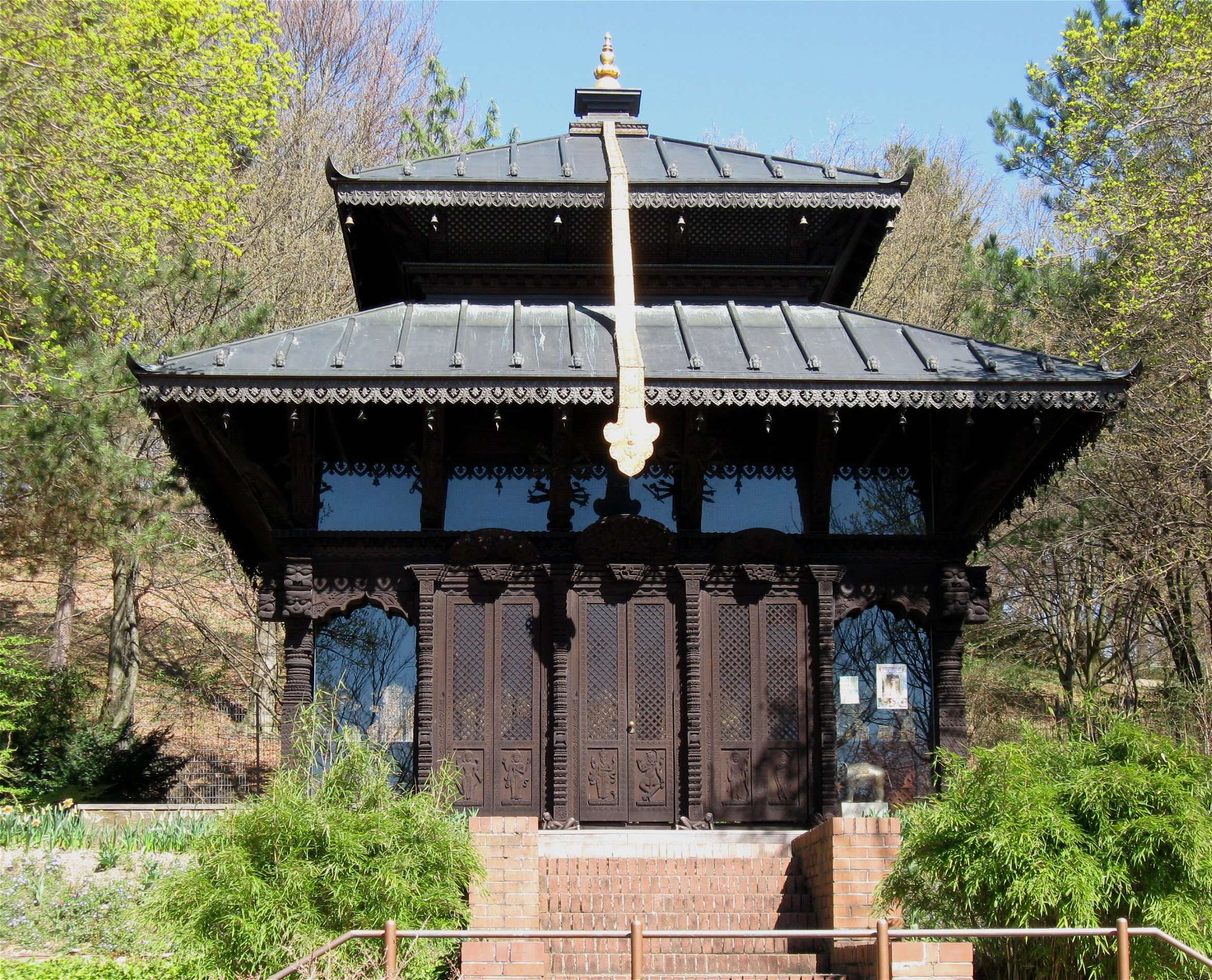 Nepalpagode im Westpark, München